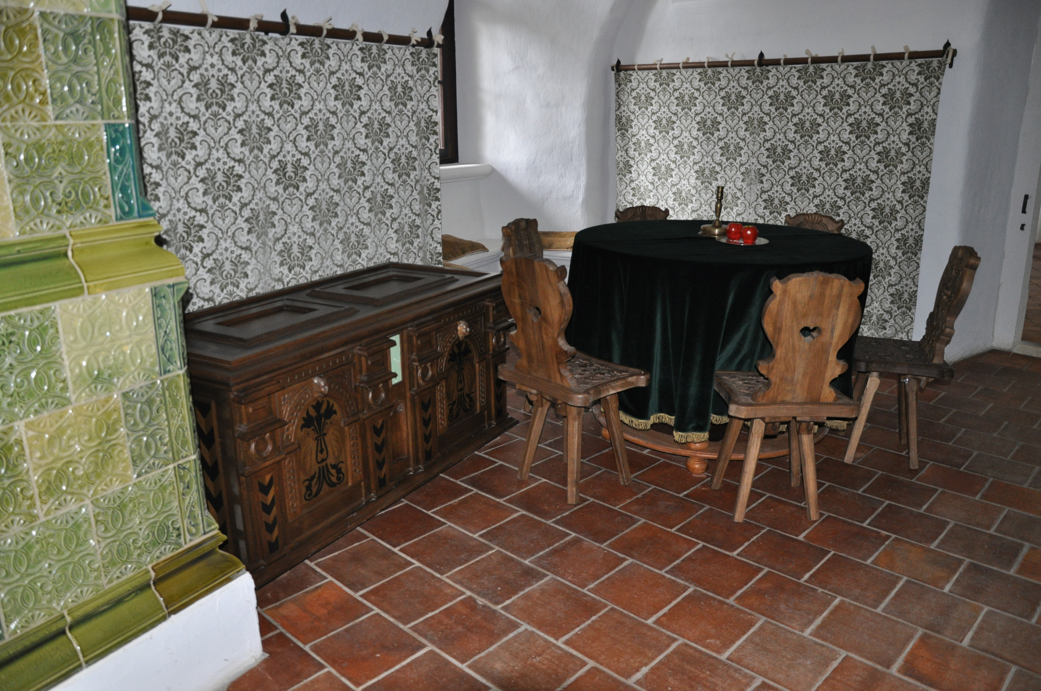 Az újjáépült Füzér vára, középső-bolt